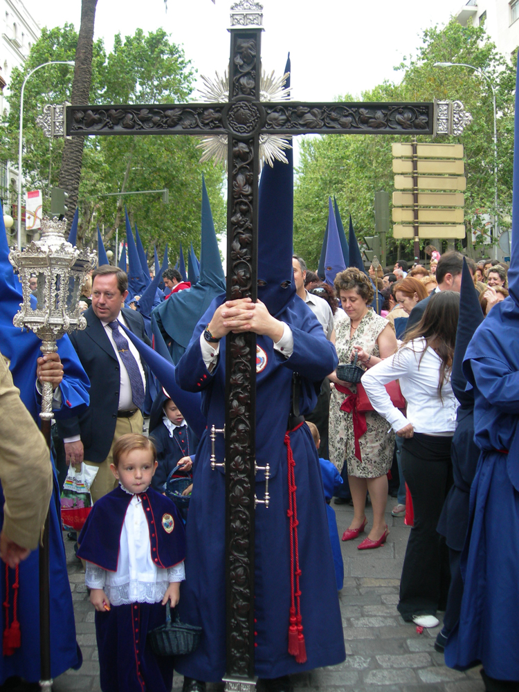 Cruz de Guía de la Hermandad del Baratillo (Semana Santa sevillana, Miercoles Santo). Foto Rafael Vega.